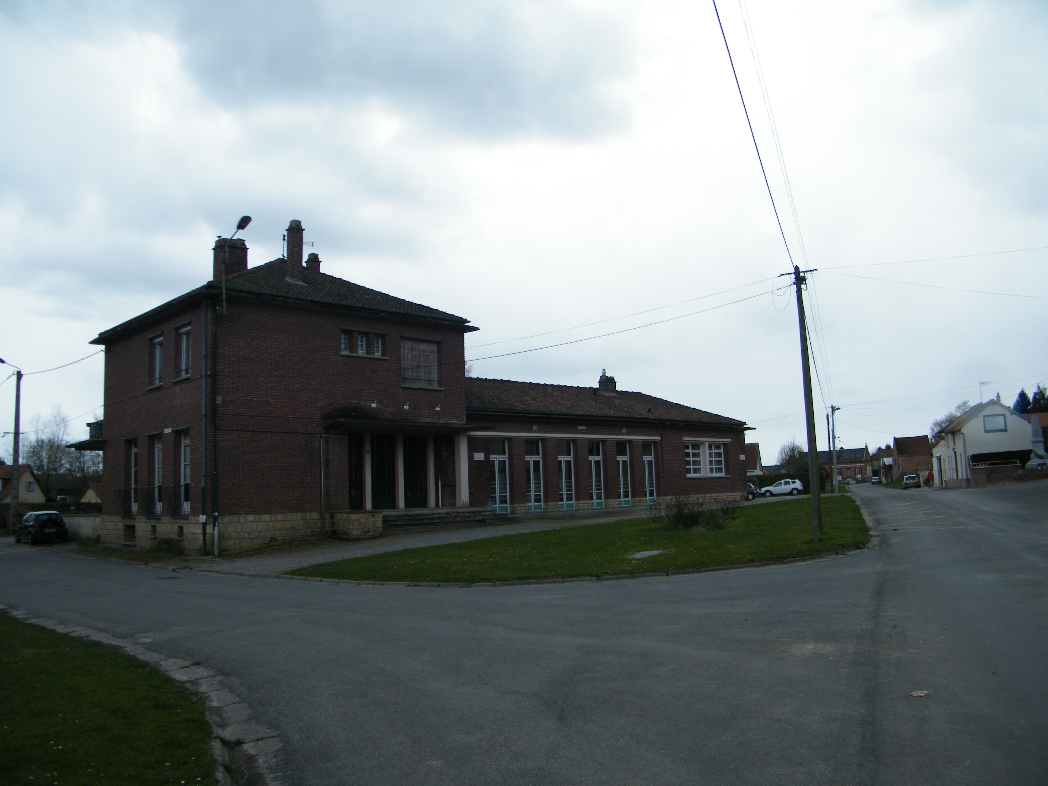 Airaines, Somme, Fr, Dreuil-Hamel, ancienne école.